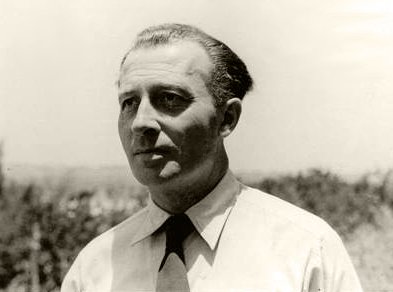 יהודה ווהל